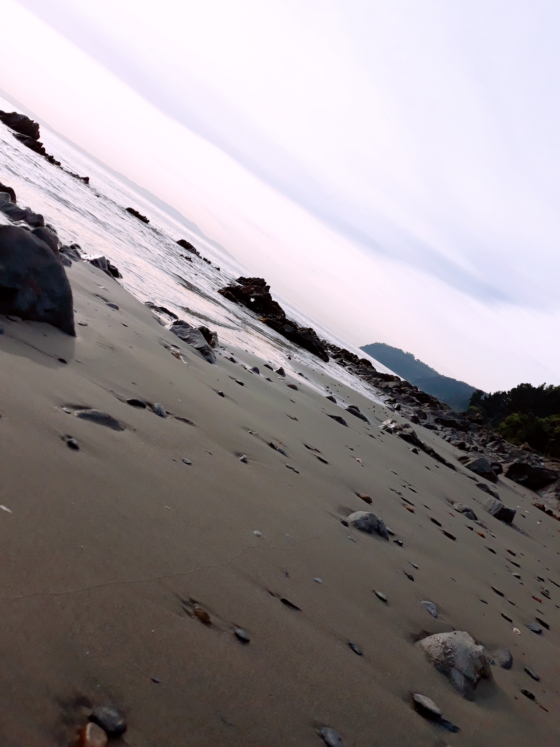 Sendero paleontológico la cata, playa la virgen, y tunel Punta de Parra